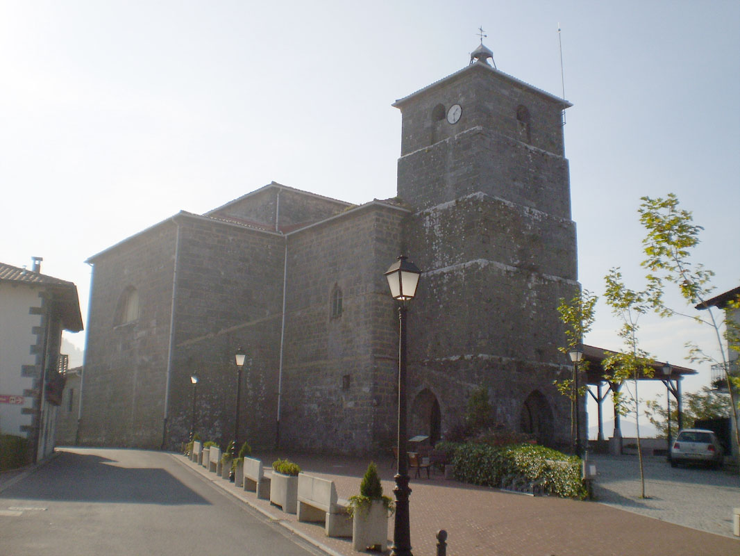 Iglesia de Santa María de Gorritiz, en el barrio de Elejalde, Nabarniz.